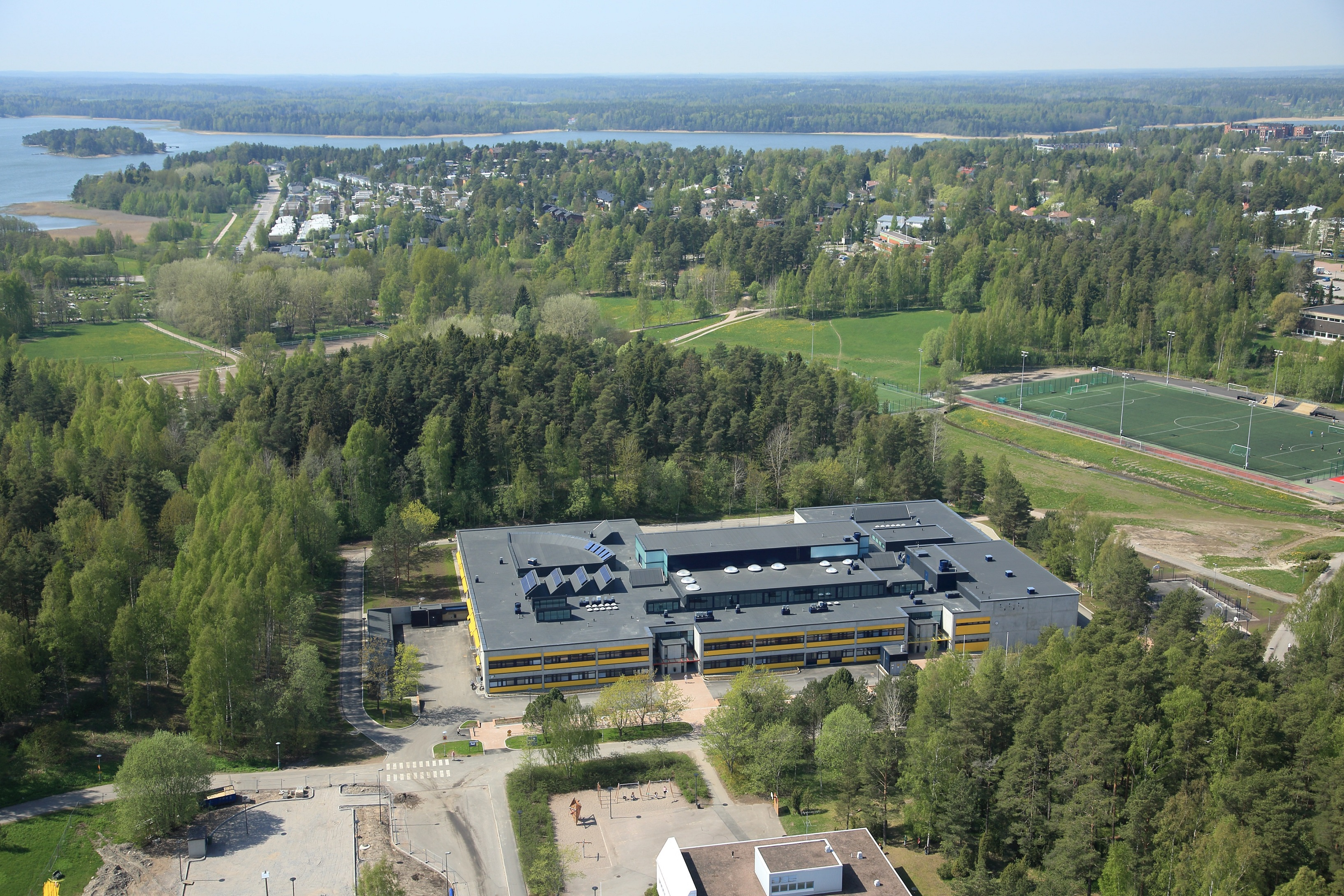 Espoonlahden lukion ilmakuva.